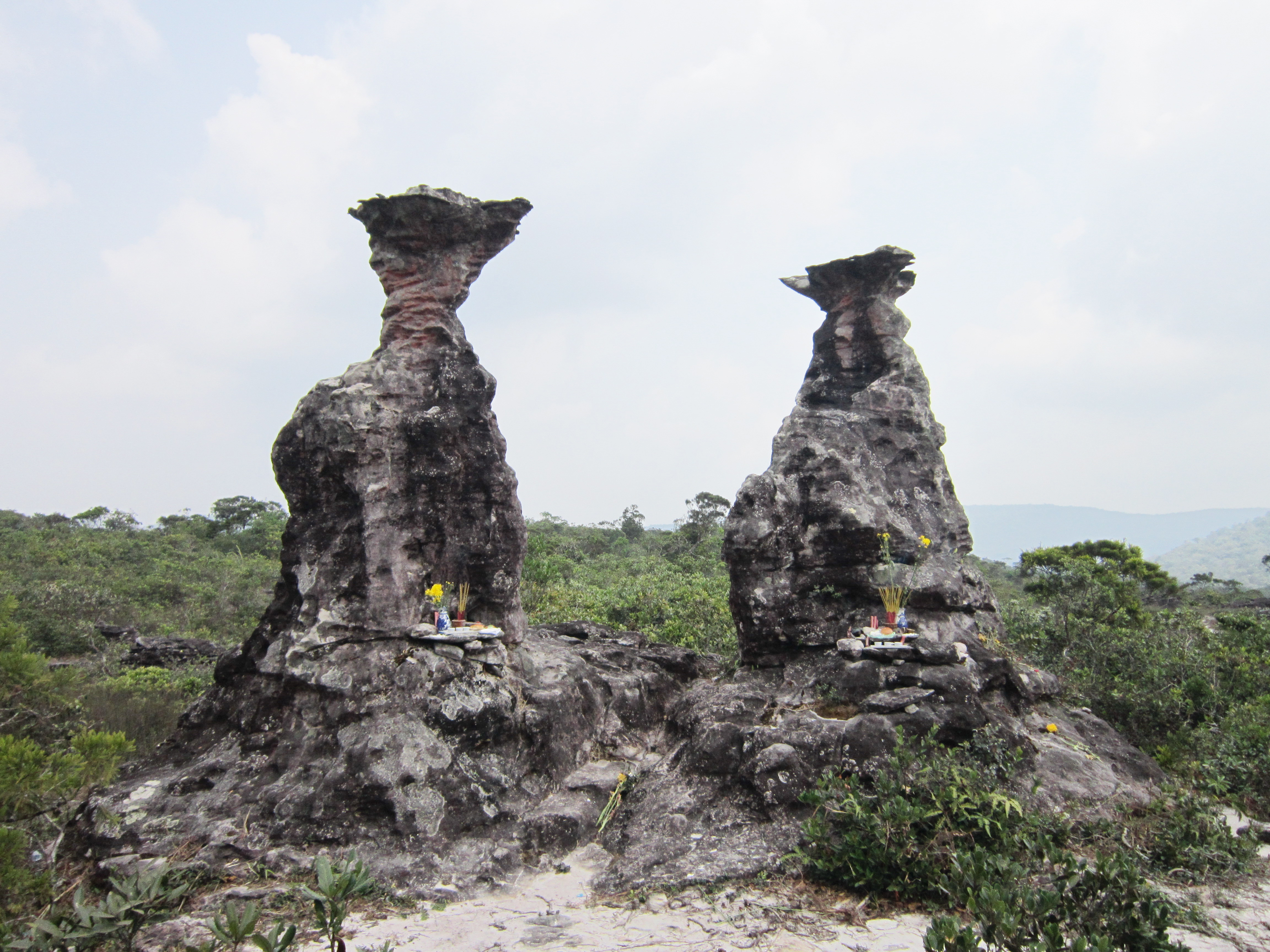 Hai trụ đá mà người Việt gọi là cổng Bàn Ngự ở trên đỉnh núi Bokor (Tà Lơn) thuộc tỉnh Kampot, Campuchia.